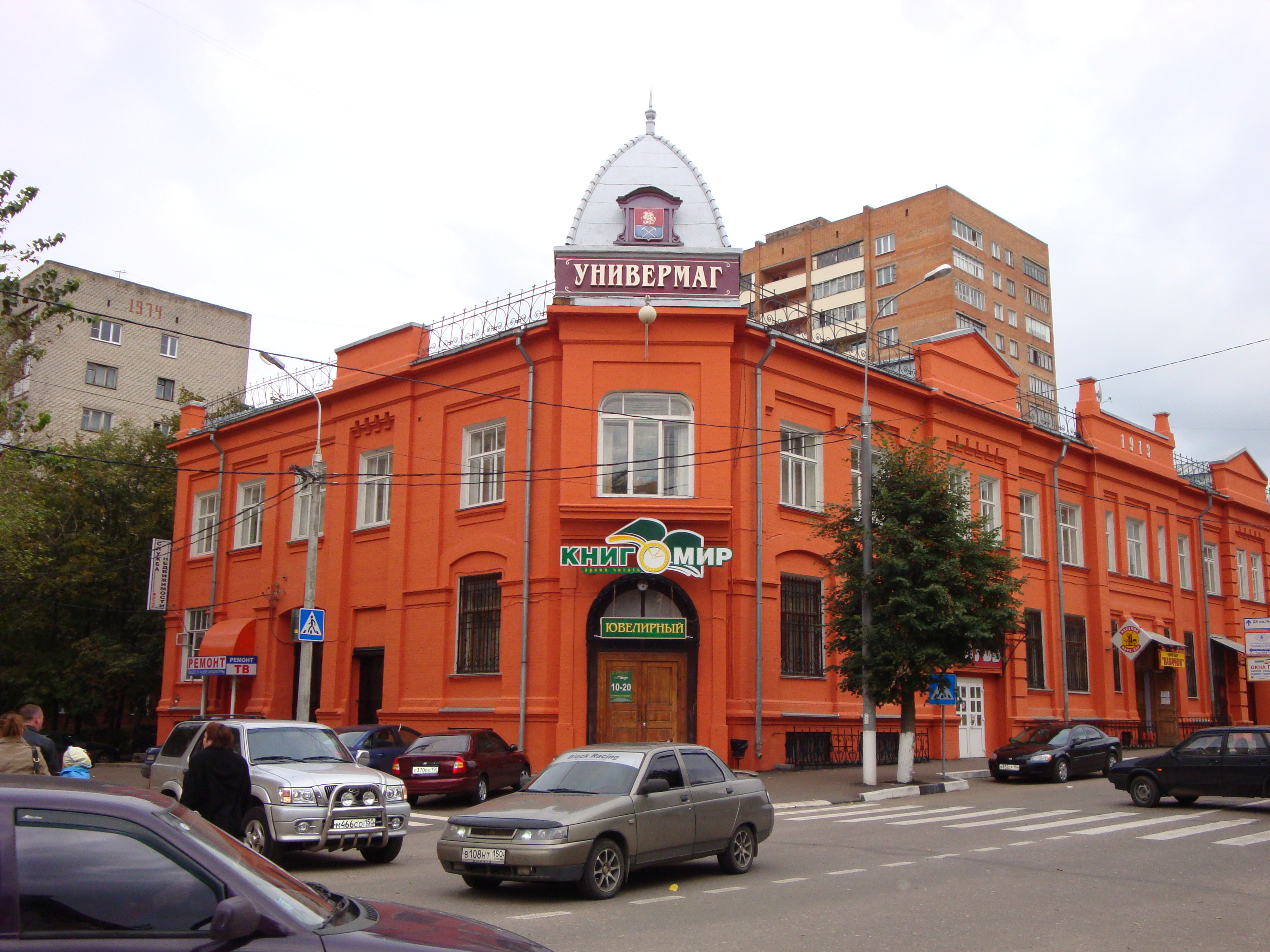 Универмаг на Революционном проспекте 1913 года постройки в Подольске. В прошлом Общество Потребителей Компании Зингер.